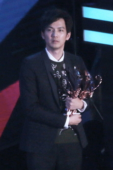 160409 深圳 音乐风云榜 -吴磊- -朴宝剑- -钟汉良- 9P